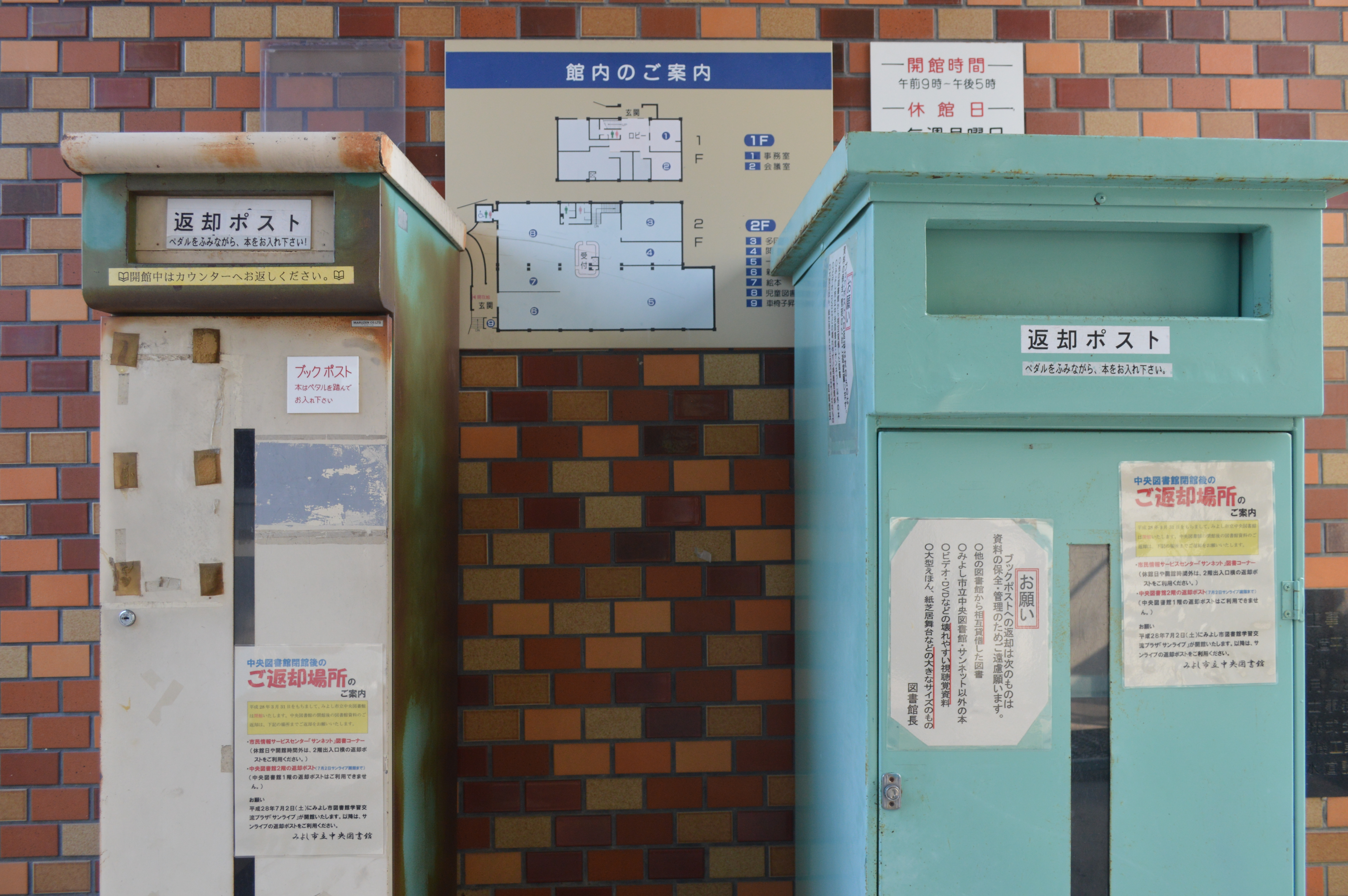 2016年3月30日をもって閉館したみよし市立中央図書館の旧館。同年7月撮影。2016年7月2日には約300m離れた場所に新館が開館している。